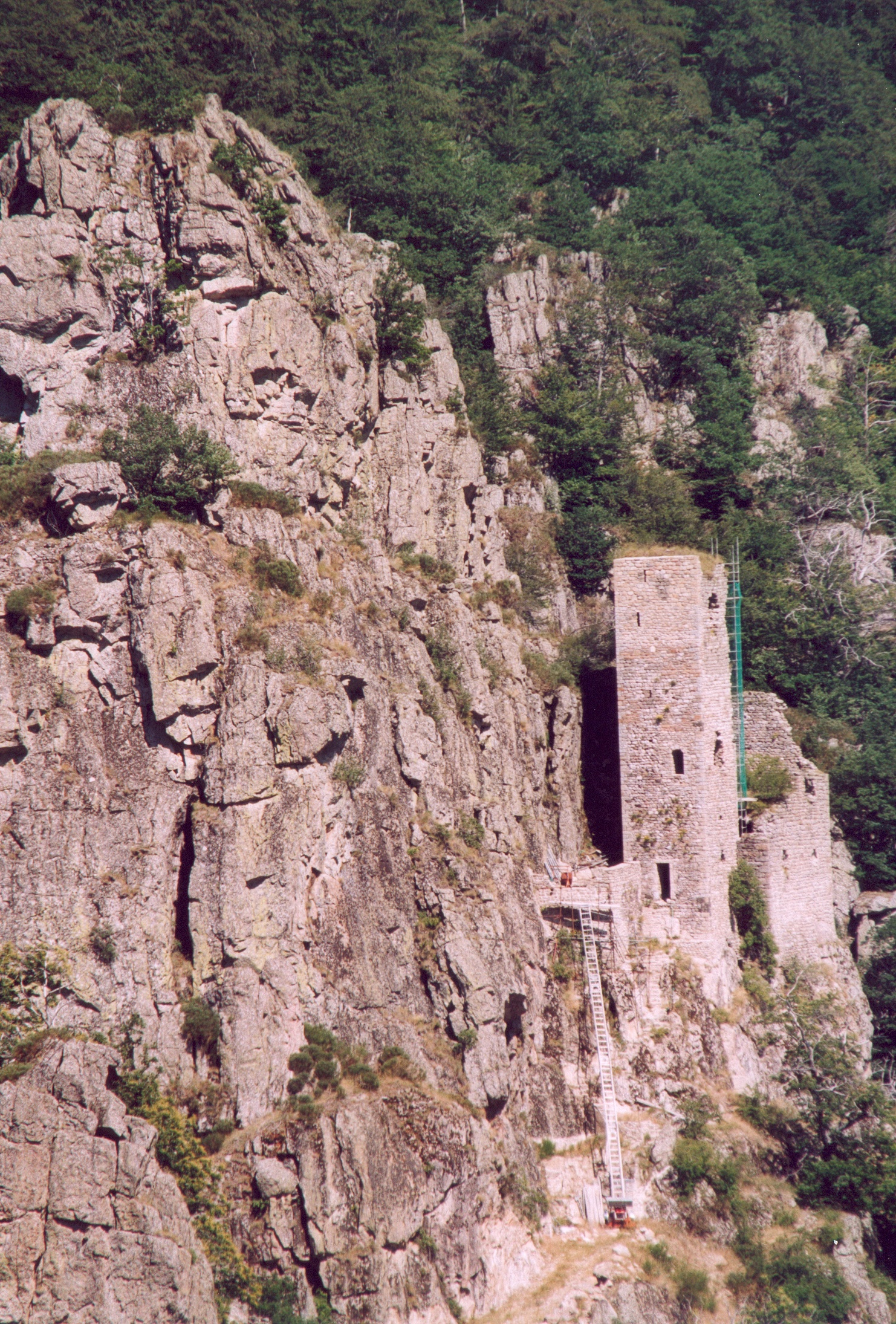 France Ardeche Borne Photographie prise par GIRAUD Patrick